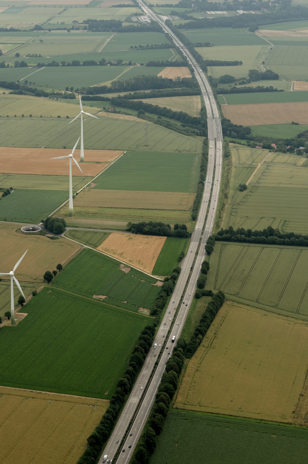 Fotoflug Sauerland Nord. A 44 bei Gerlingen, Blickrichtung Ost. The making of this document was supported by the Community-Budget of Wikimedia Germany.